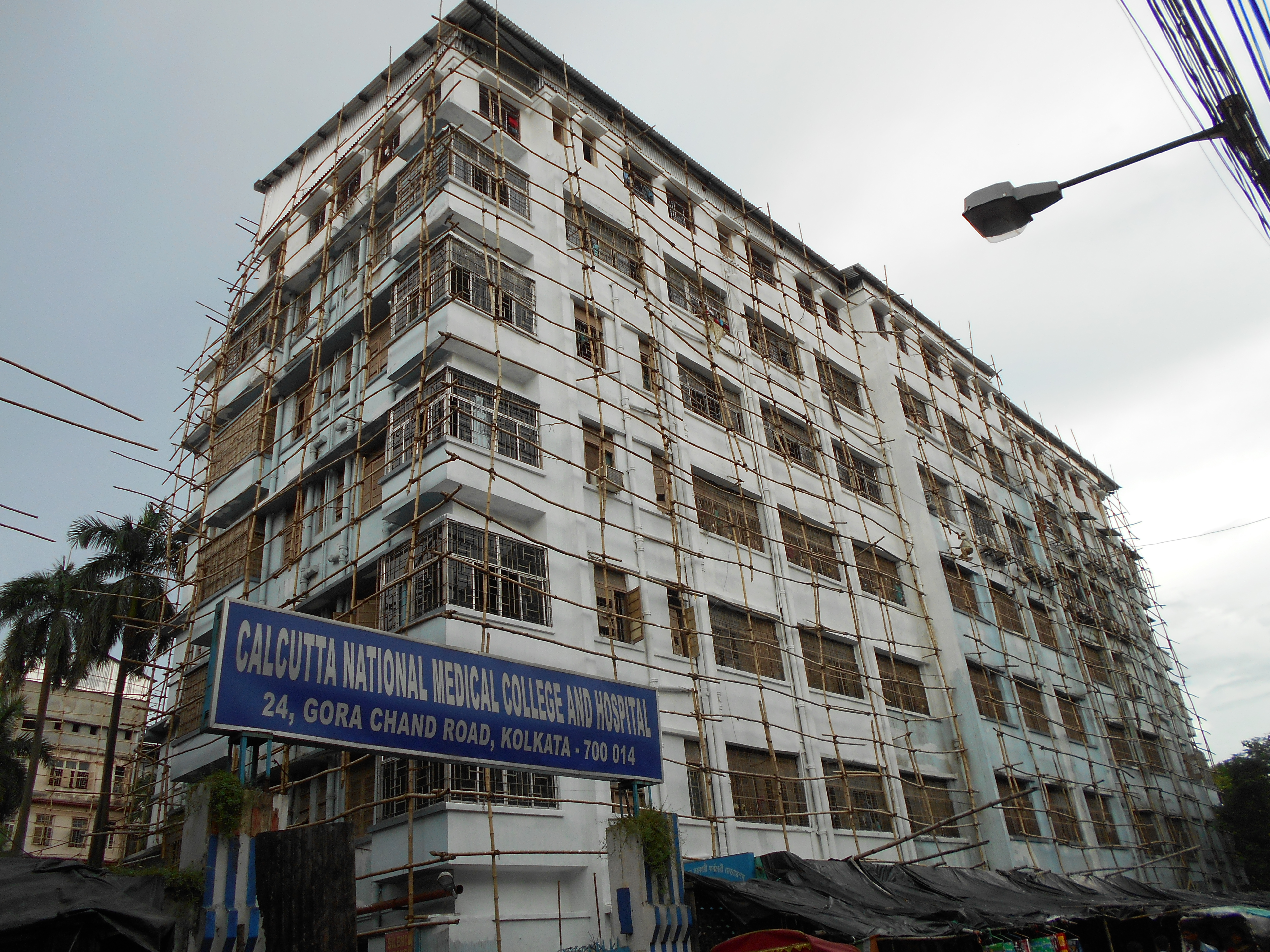 Calcutta National Medical College and Hospital